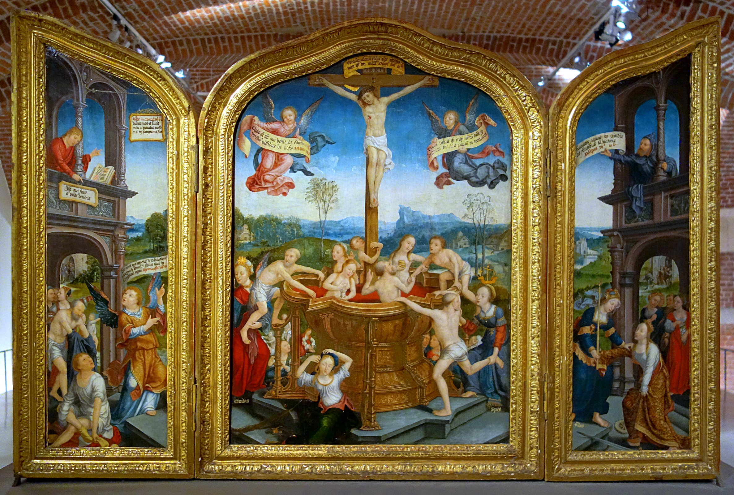 Tryptique du bain mystique.